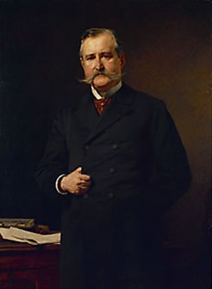 Portrait of Viktor Freiherr von Fuchs (1840-1921)